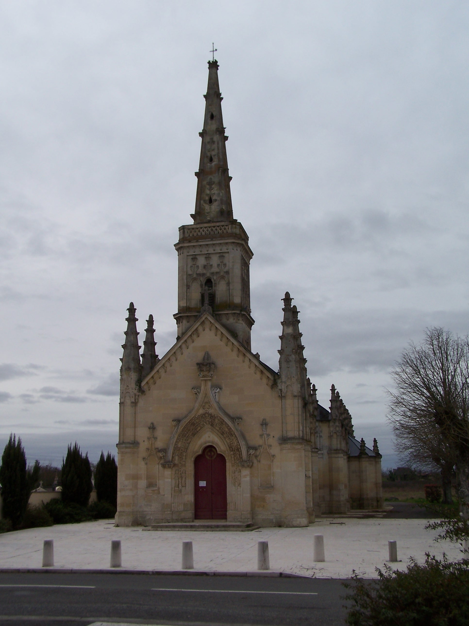 Église de Saint-Vincent-de-Paul (Gironde, France)